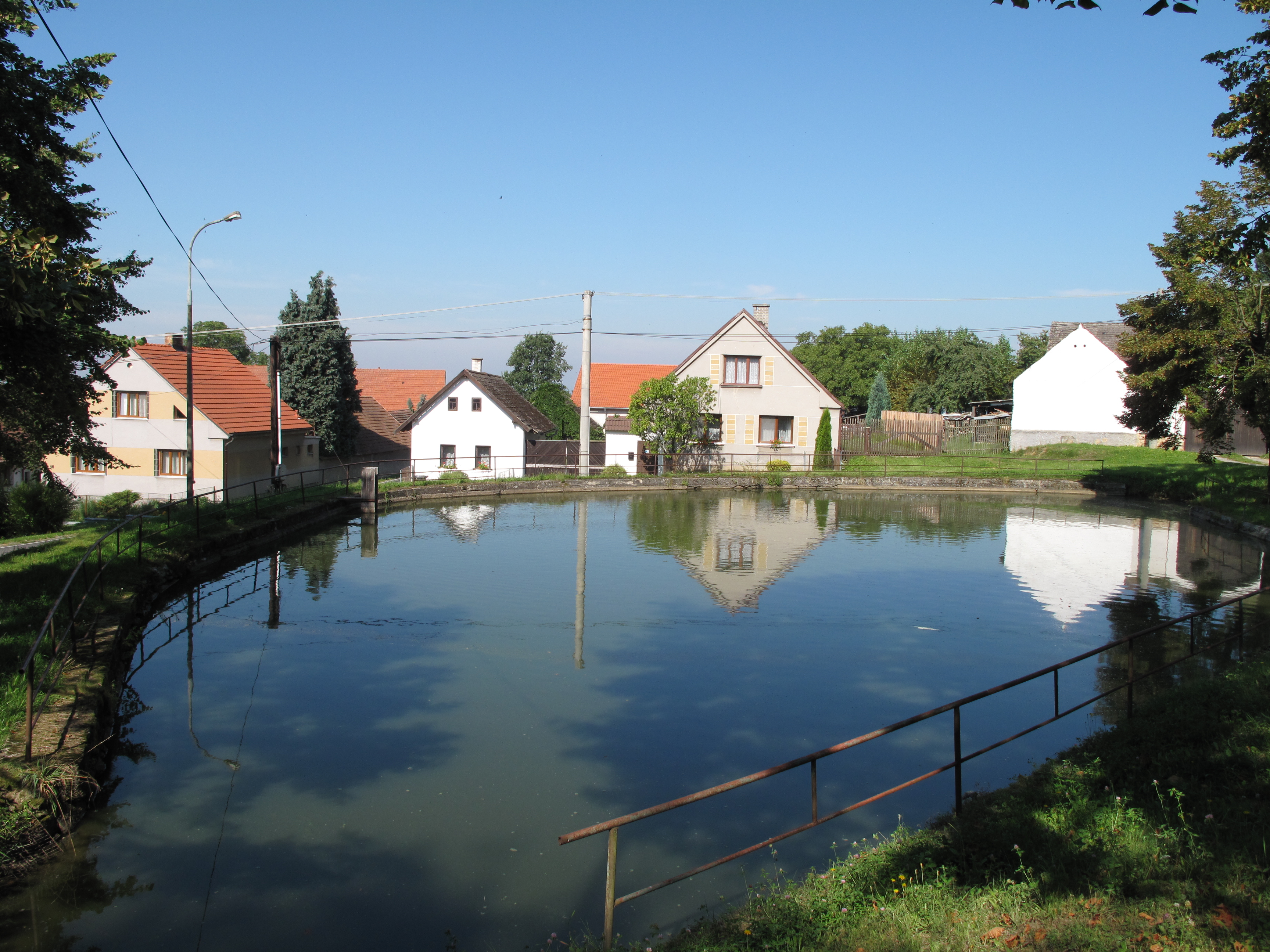 Dub (Ratibořské Hory). Okres Tábor, Česká republika.